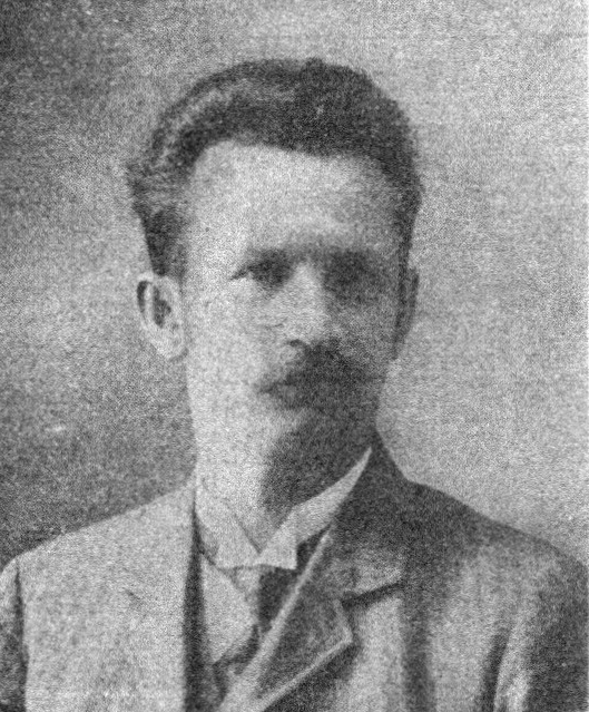 Österreichischer Politiker, Reichsratswahl 1907, Name siehe Dateiname